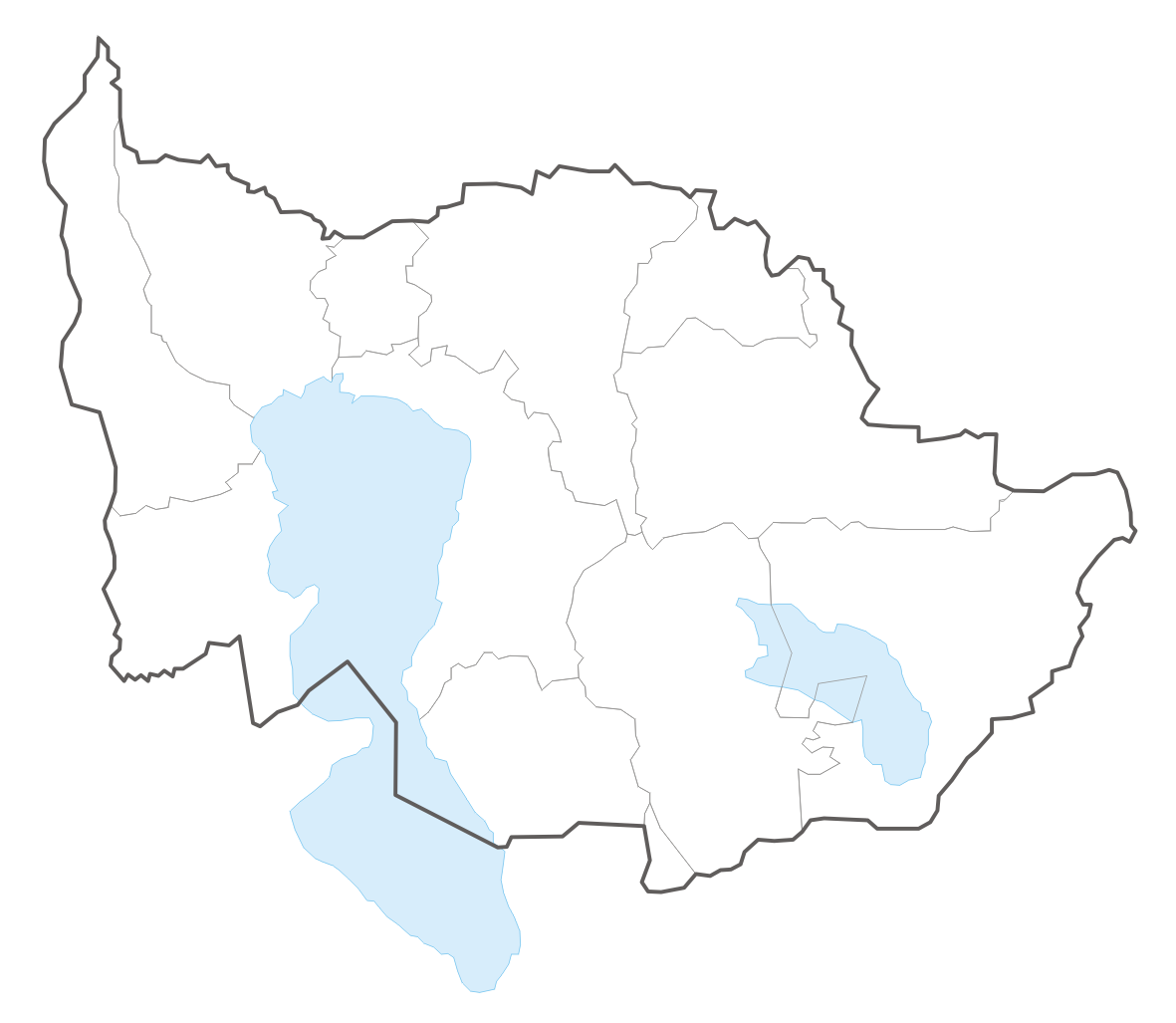 Municipalities in Canton Zug / Gemeinden des Kantons Zug